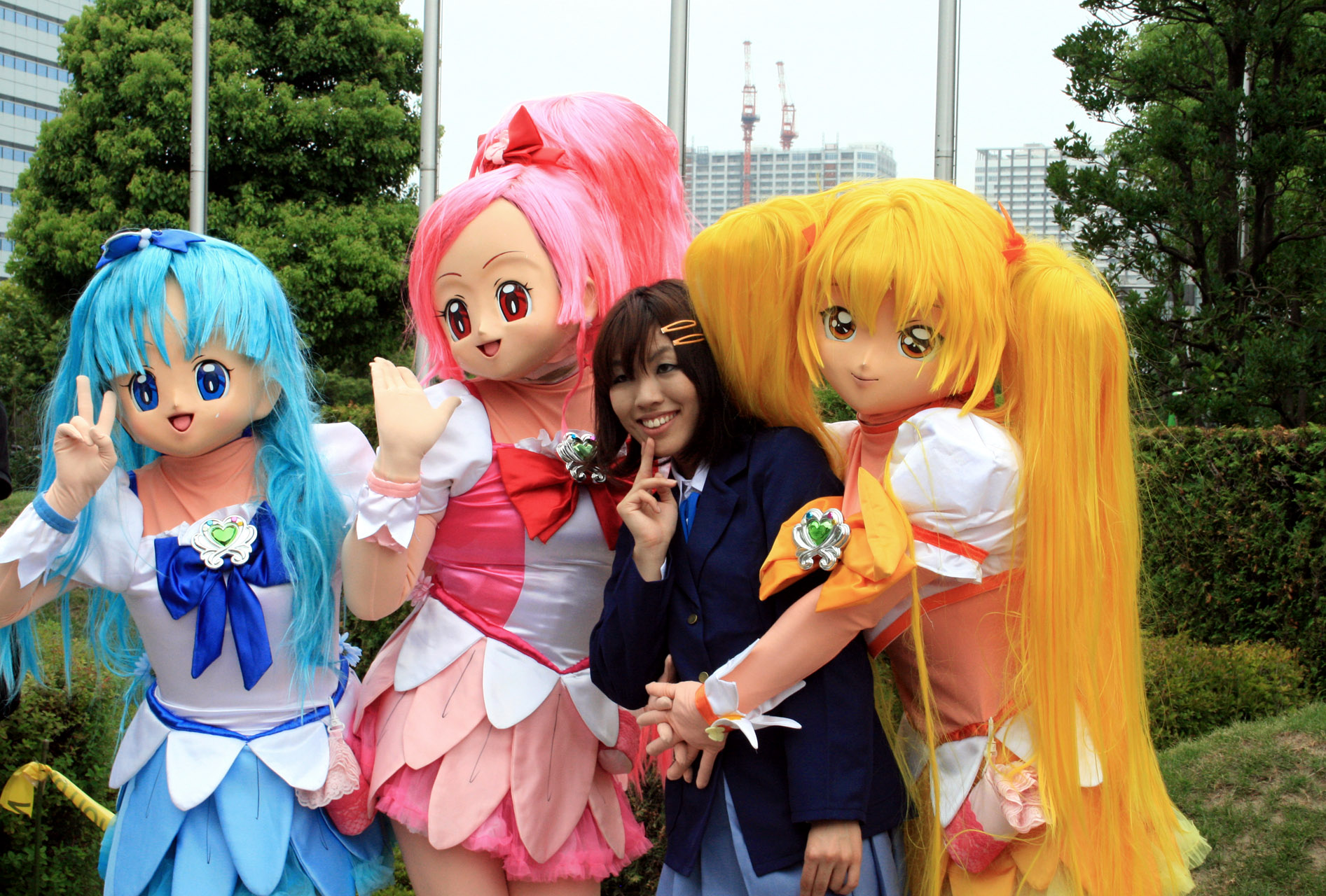 コミックマーケット78に参加していたハートキャッチプリキュア!の着ぐるみ